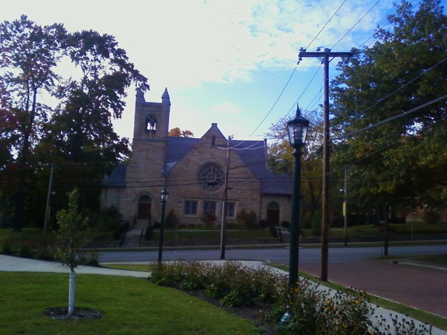 Outside Ford Chapel.